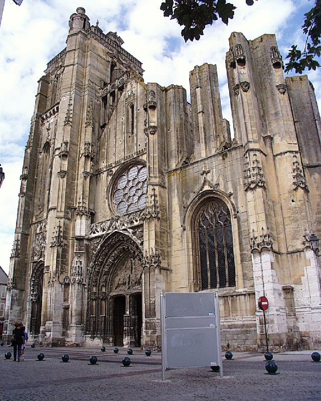 Bilder aus Dreux